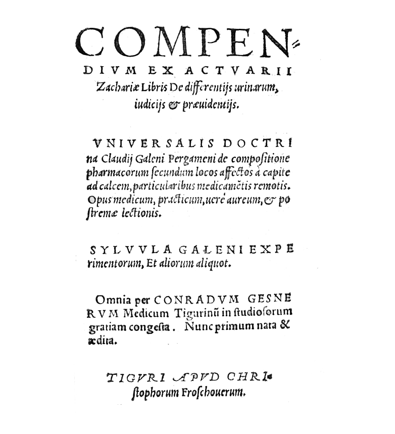 Titelblatt